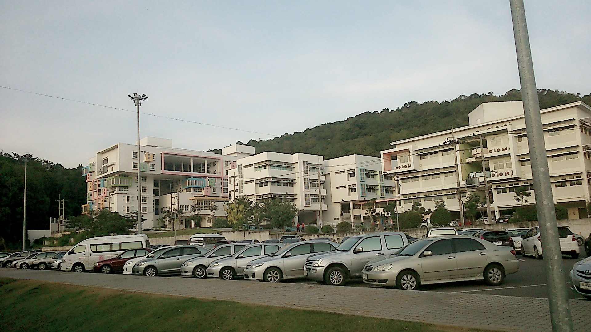 บรรยกาศภายนอกของโรงเรียนมอ.วิทยานุสรณ์ ถ่ายจากศูนย์ประชุมนานาชาติฉลองสิริราชสมบัติครบ 60 ปี